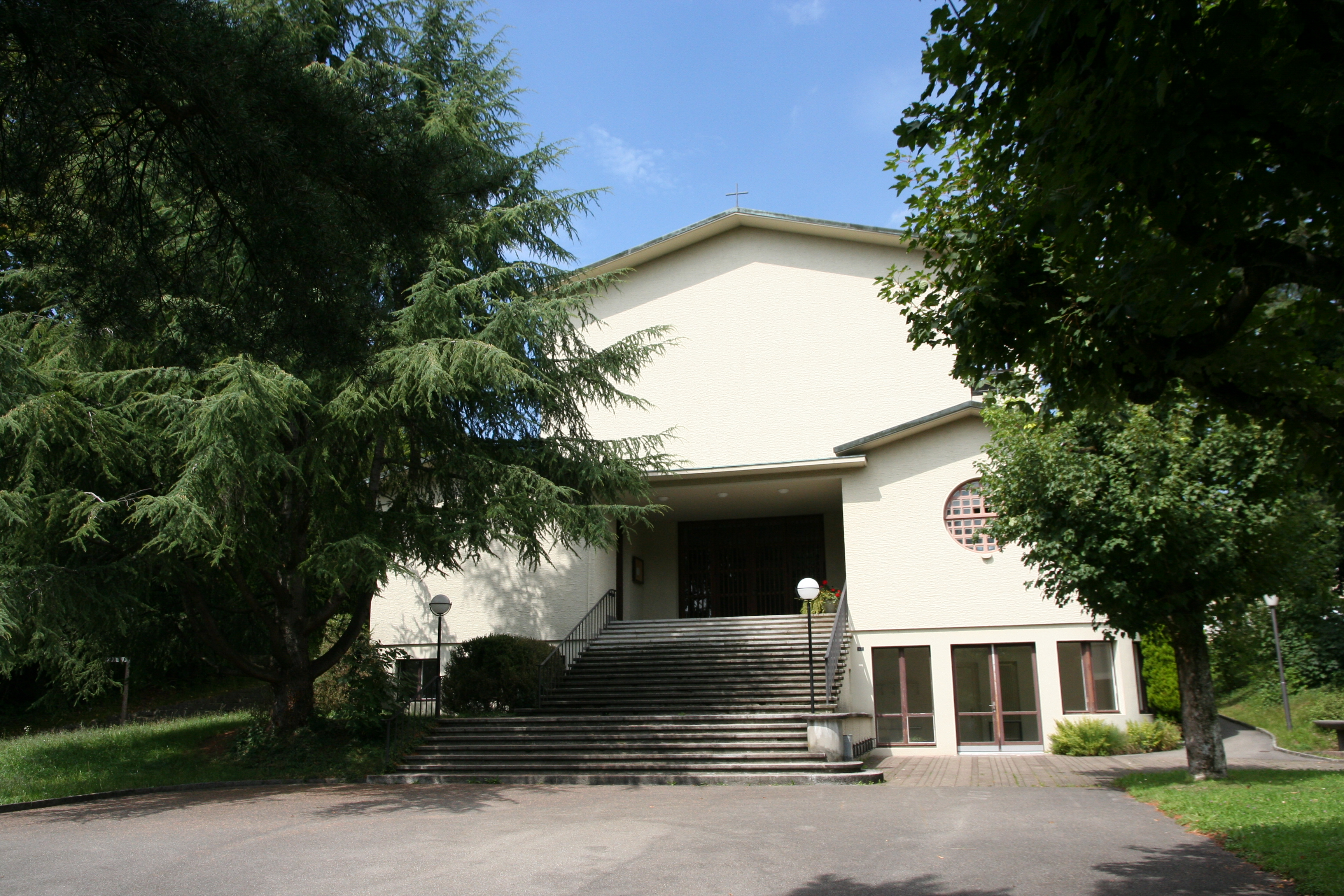 Römisch-katholische Pfarrkirche Maria Himmelfahrt Schönenwerd SO